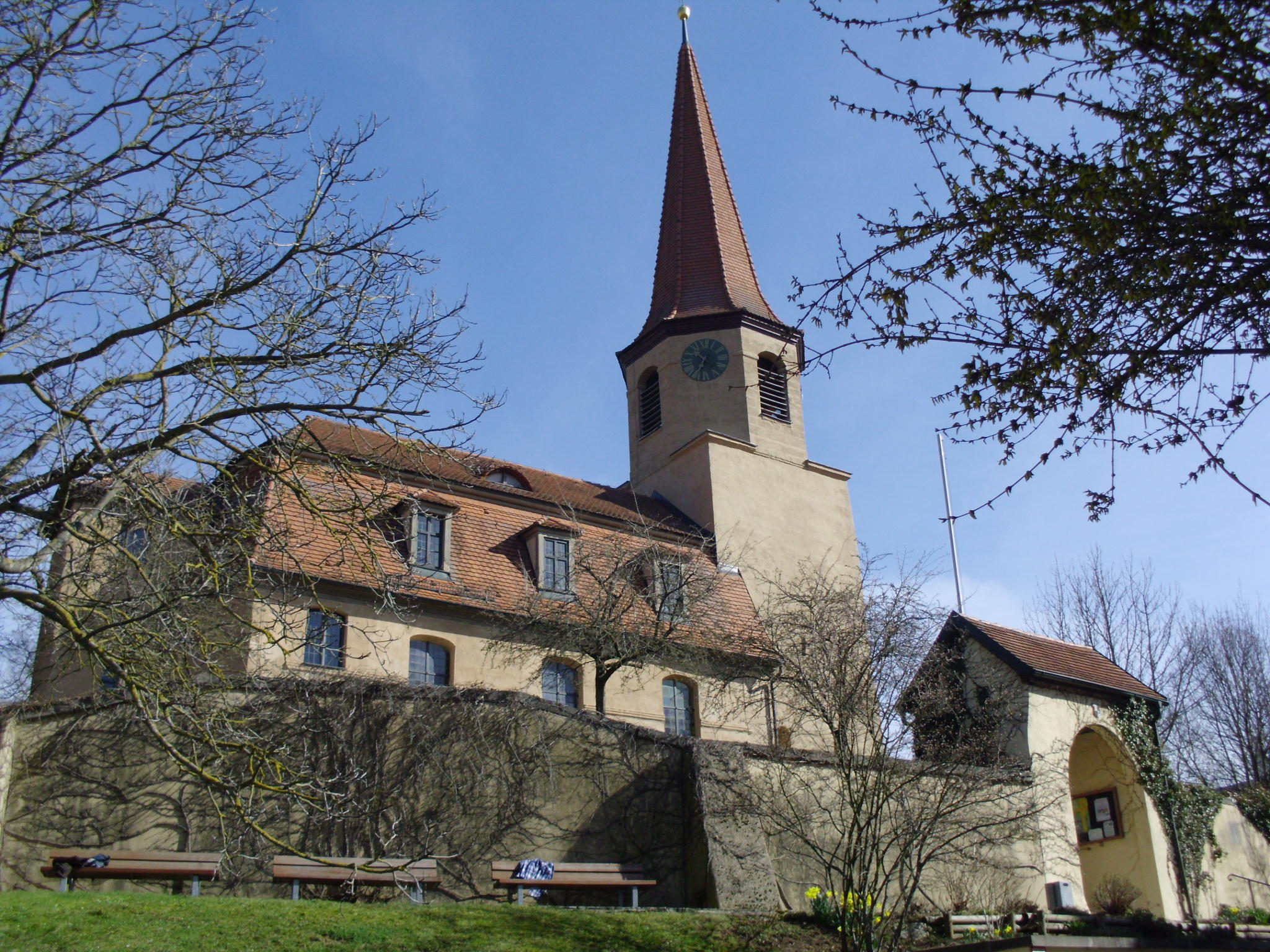 Evang.-Luth. Pfarrkirche St. Michael in Pfofeld im Landkreis Weißenburg-Gunzenhausen, Süd-West-Anscicht